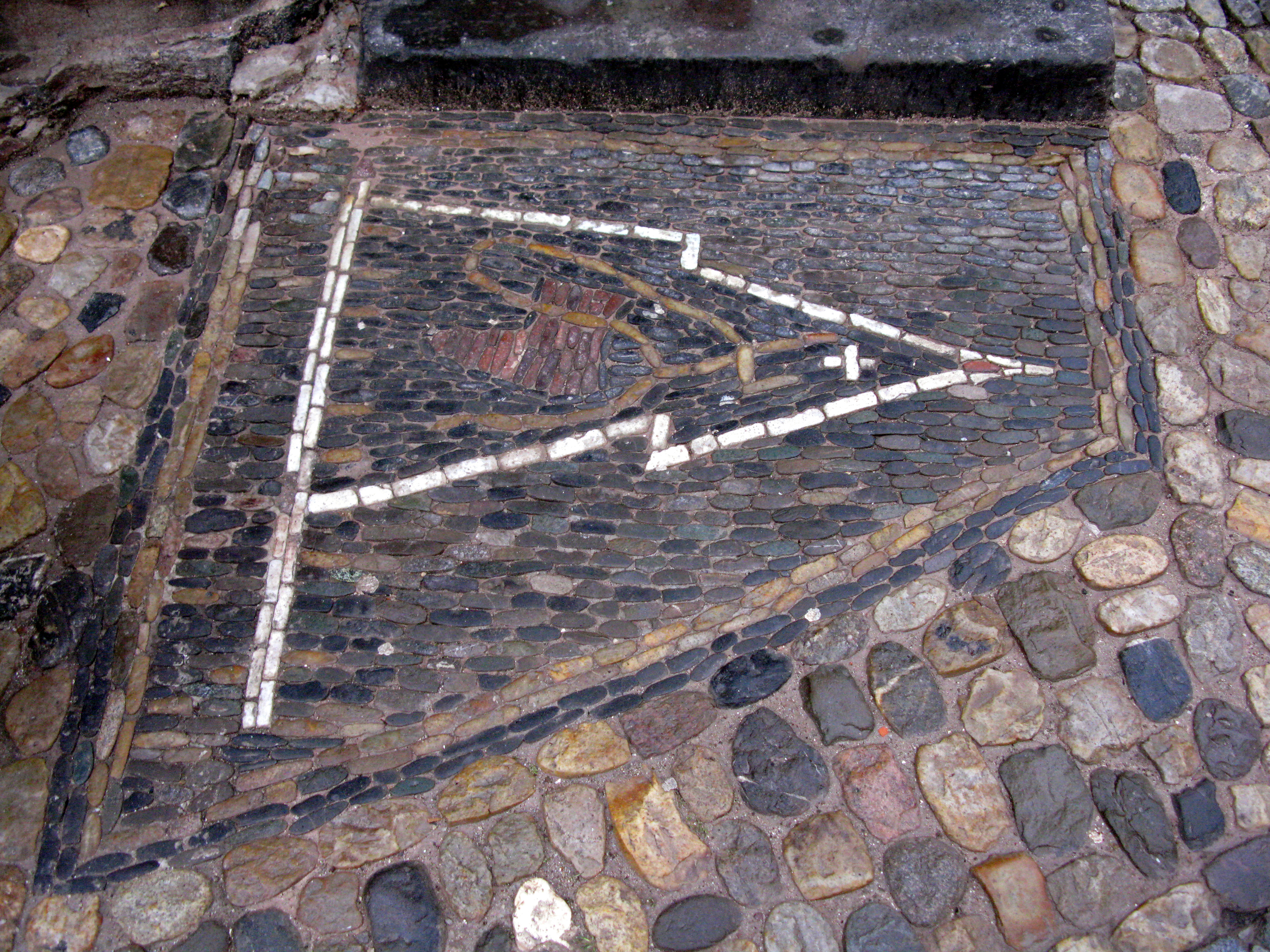 Pflastermosaik in Freiburg vor der Zinnfigurenklause im Schwabentor zeigt eine Fahne mit Bundschuh, Zeichen der Bundschuh-Bewegung von aufständischen Bauern. Dioramen von den Bauernkriegen sind in der Zinnfigurenklause zu sehen.